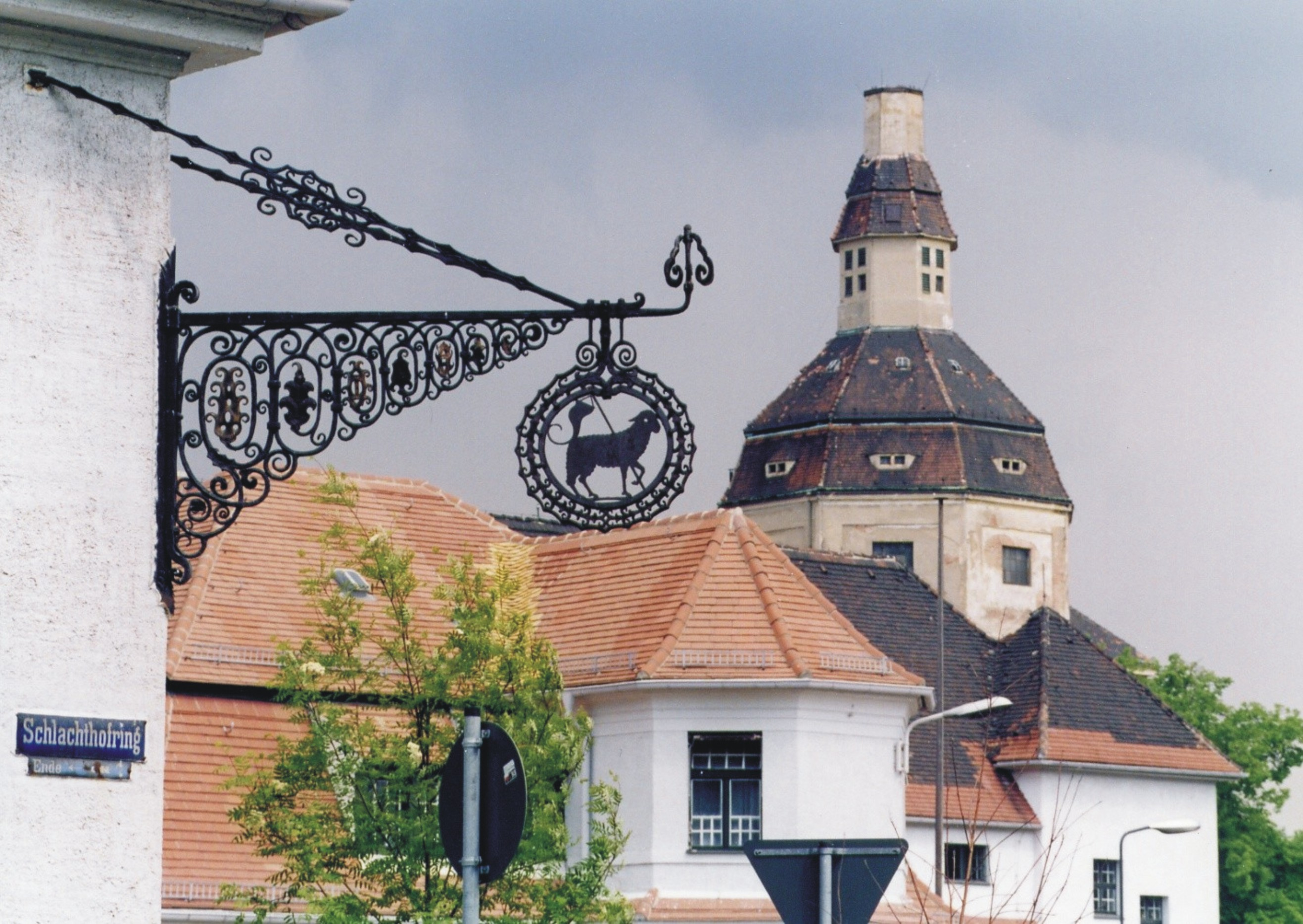 Dresdner Vieh- und Schlachthof (1906-1910), Blick vom ehemaligen Gasthaus zum Schornstein